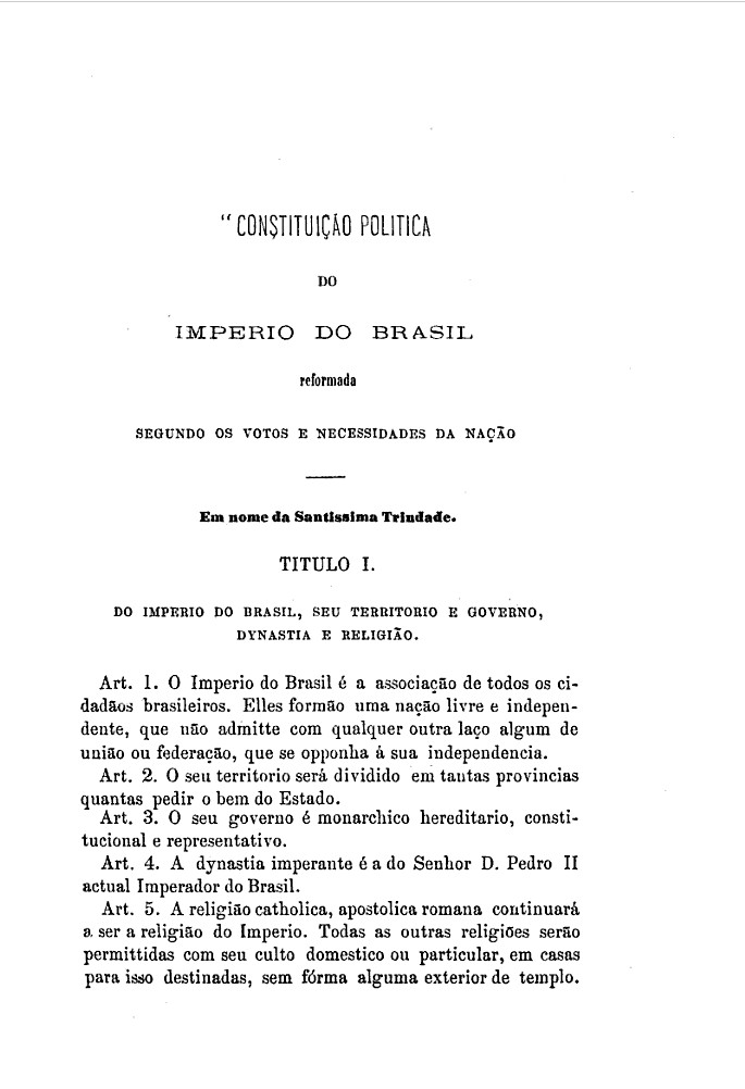 Primeira página da Constituição de Pouso Alegre, editada no contexto do Golpe de 30 de julho de 1832, e impressa pelo Padre José Bento - segundo reprodução facsimilar da obra Escriptos historicos e litterarios, do Barão Homem de Melo.